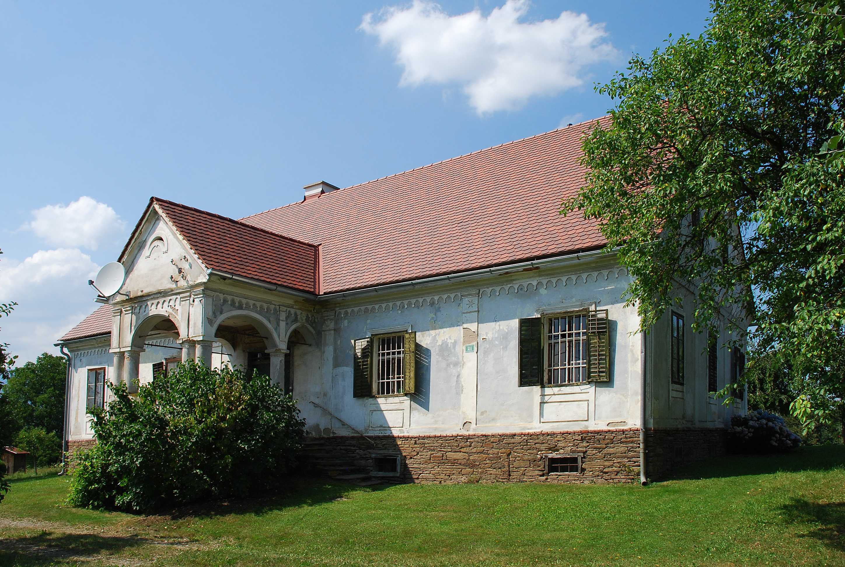 Frauental, Steiermark, Österreich: Ortsteil Schamberg Bauernhaus vulgo Rotschädel (Erzherzog Johann Haus)